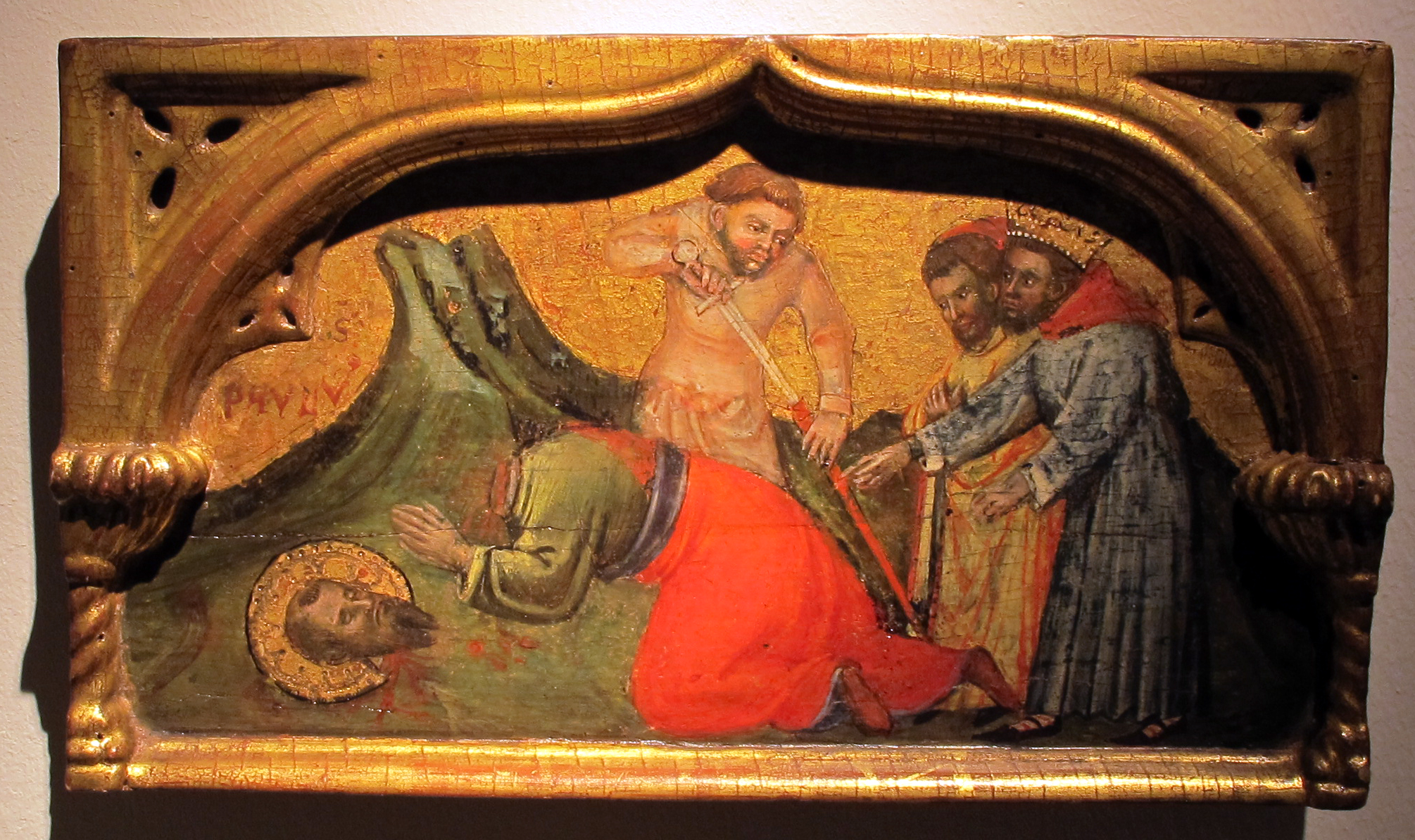 XXVIII Biennale dell'Antiquariato (2013), Courtesy of Moretti